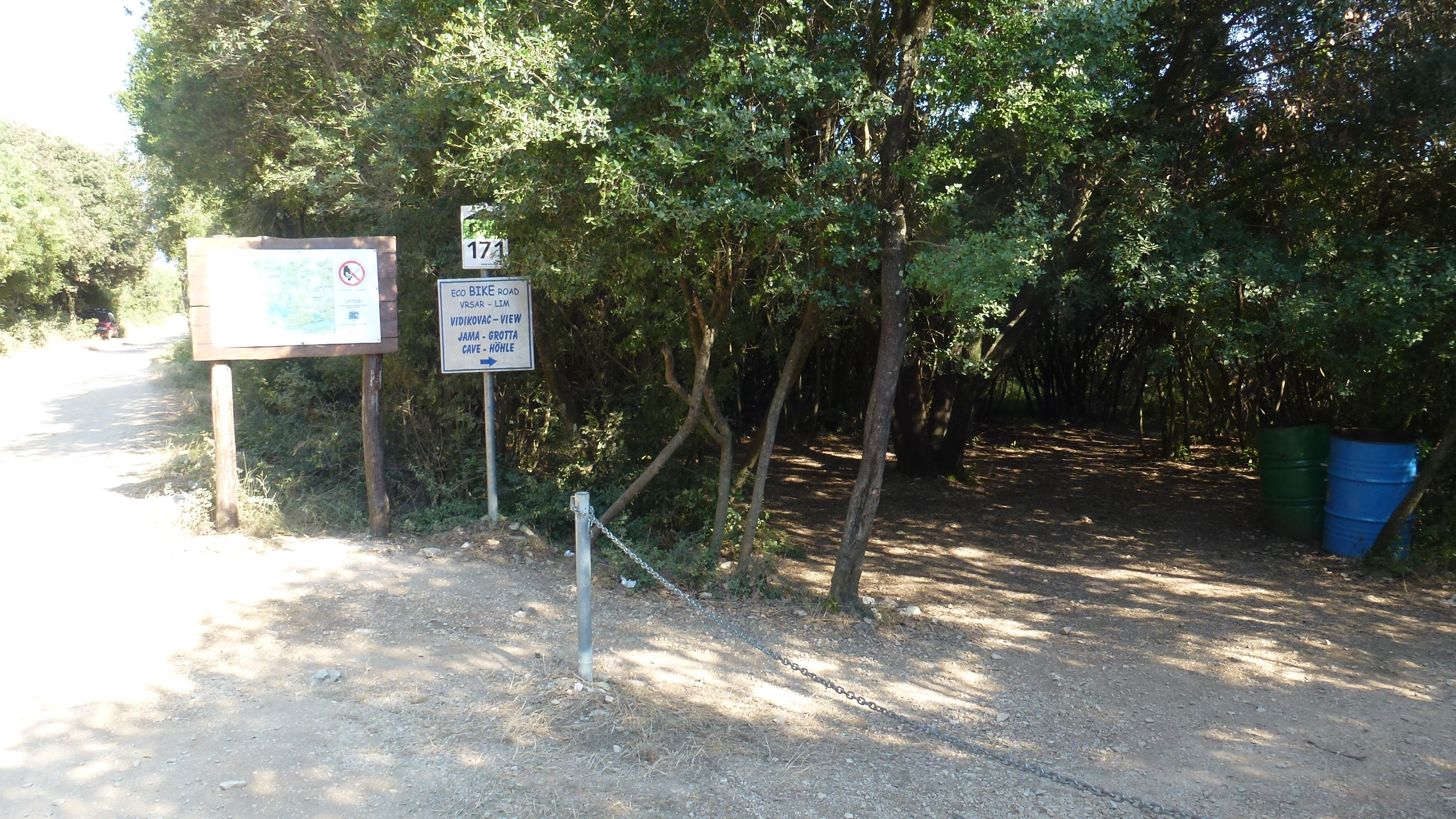 52450, Kloštar, Croatia